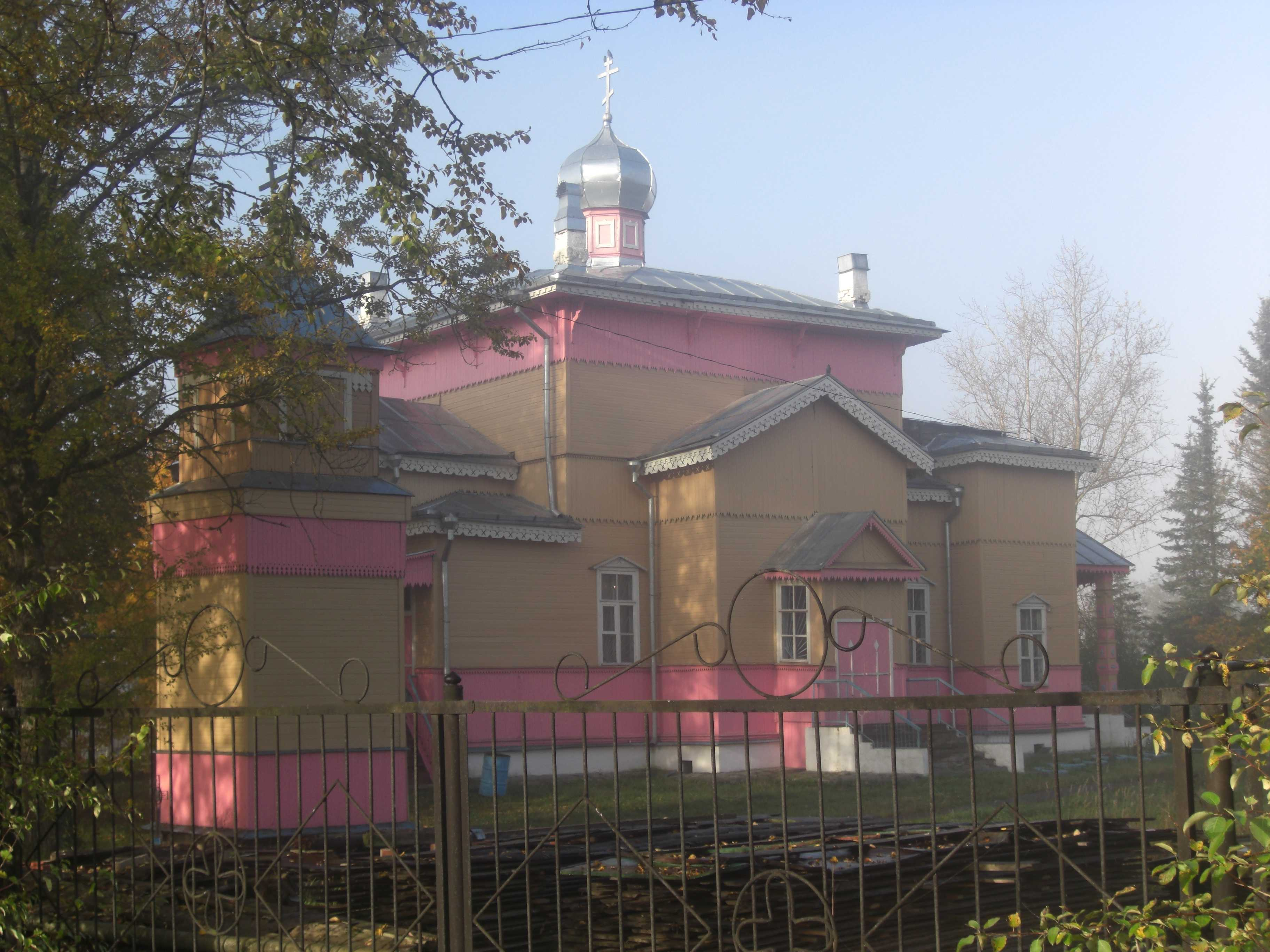 Церковь Святого благоверного князя Александра Невского в Волосово